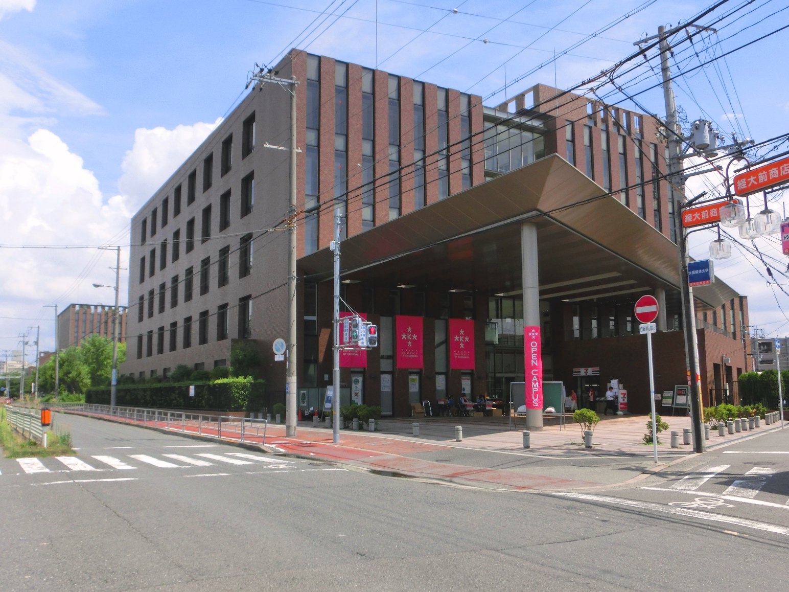 大阪経済大学のB館。上新庄駅側にある入口。